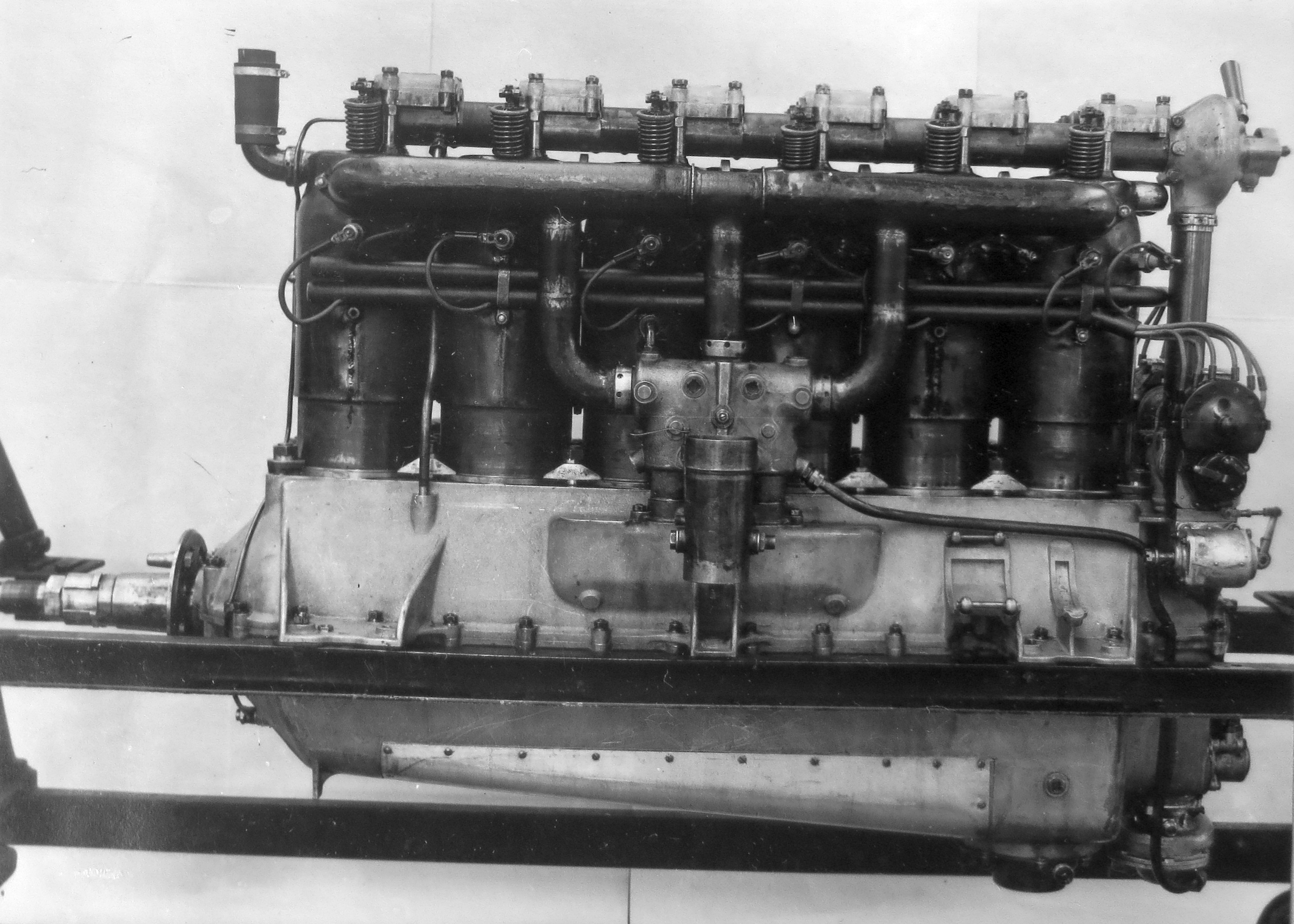 Walter W-IV (1923-8)